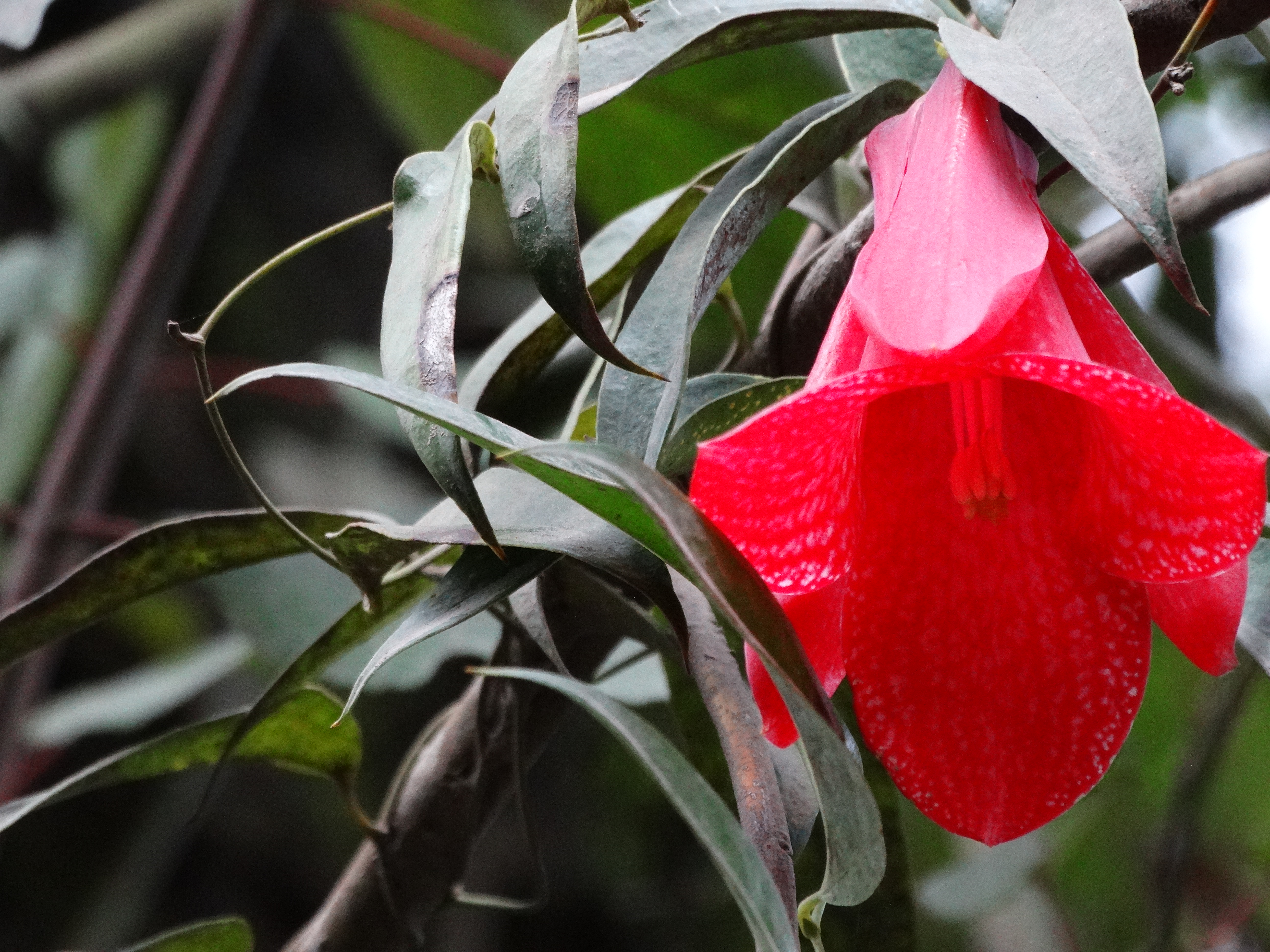 Copihue tomado en el Lago Colico IX region